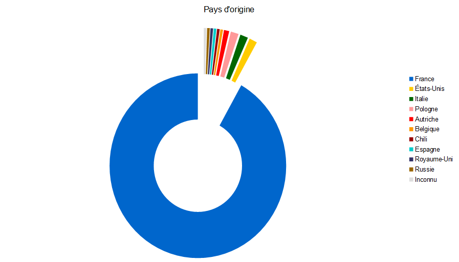 Diagramme en anneau éclaté représentant les pays d'origine des personnalités ayant donné leur nom à une ou plusieurs voies de Saint-Priest. France États-Unis Italie Pologne Autriche Belgique Chili Espagne Royaume-Uni Russie Inconnu